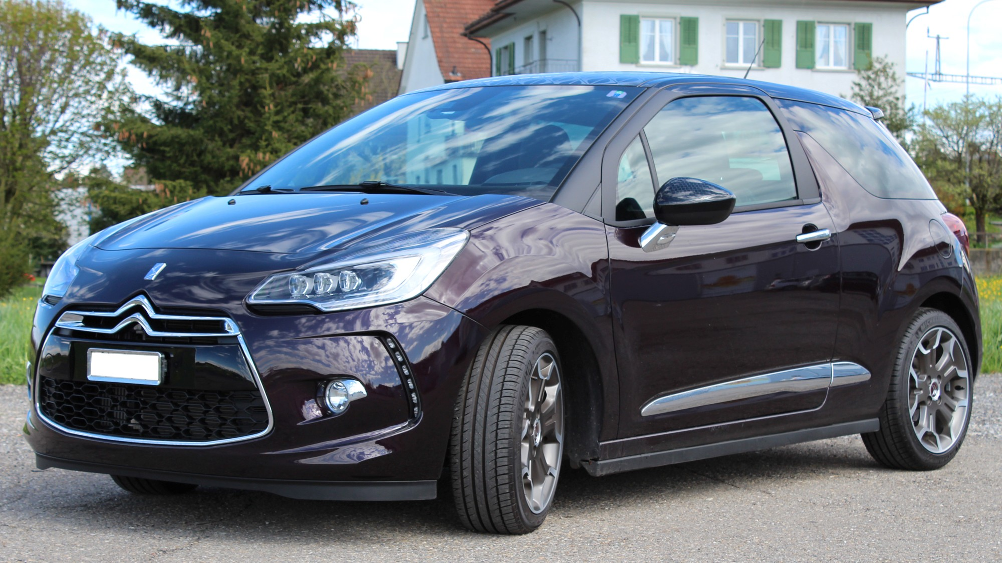 1.6 THP 165 Stop&Start 6-Gang-Manuell.